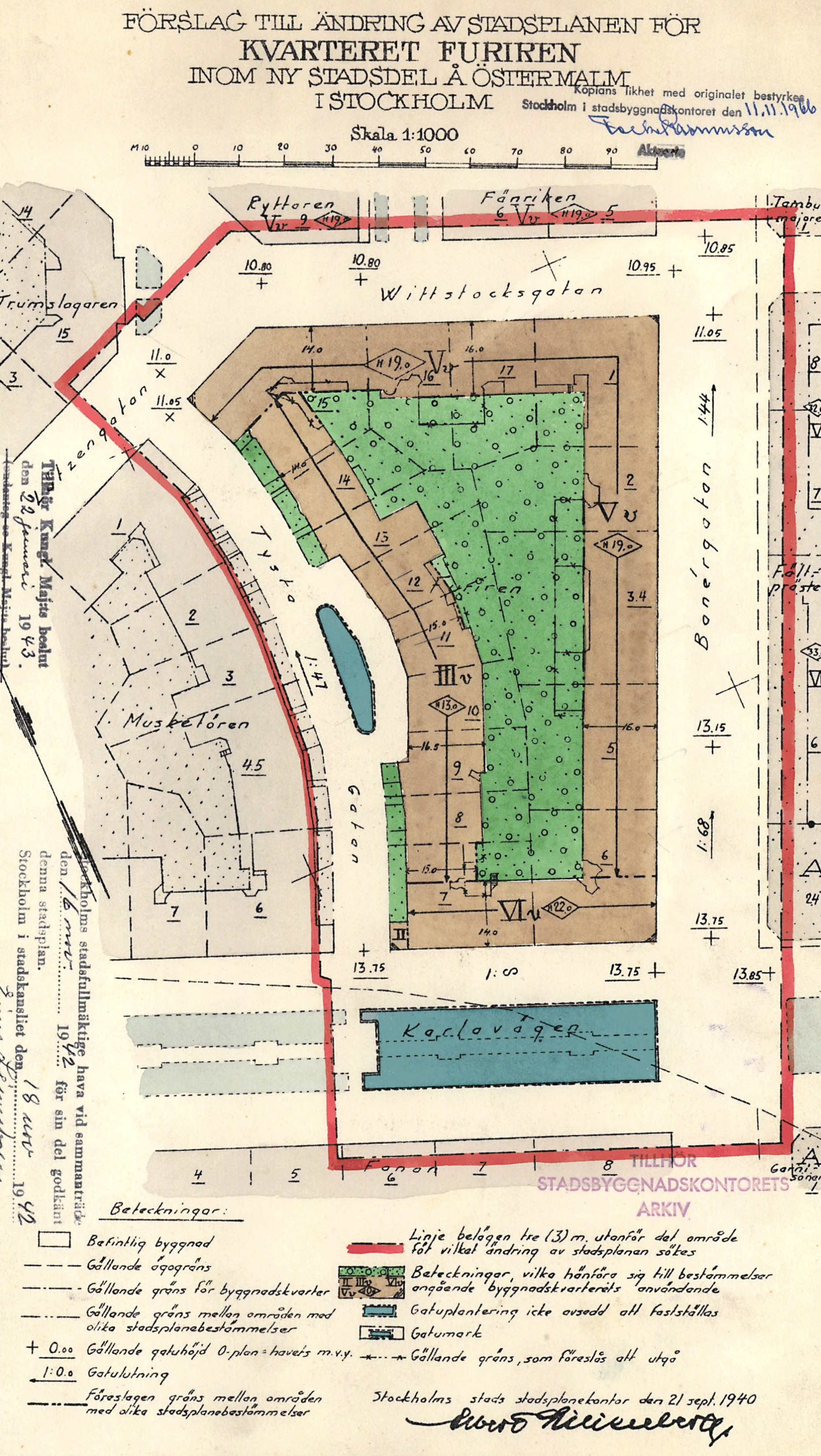 Stadsplan för kvarteret Furiren, vid Tysta gatan.